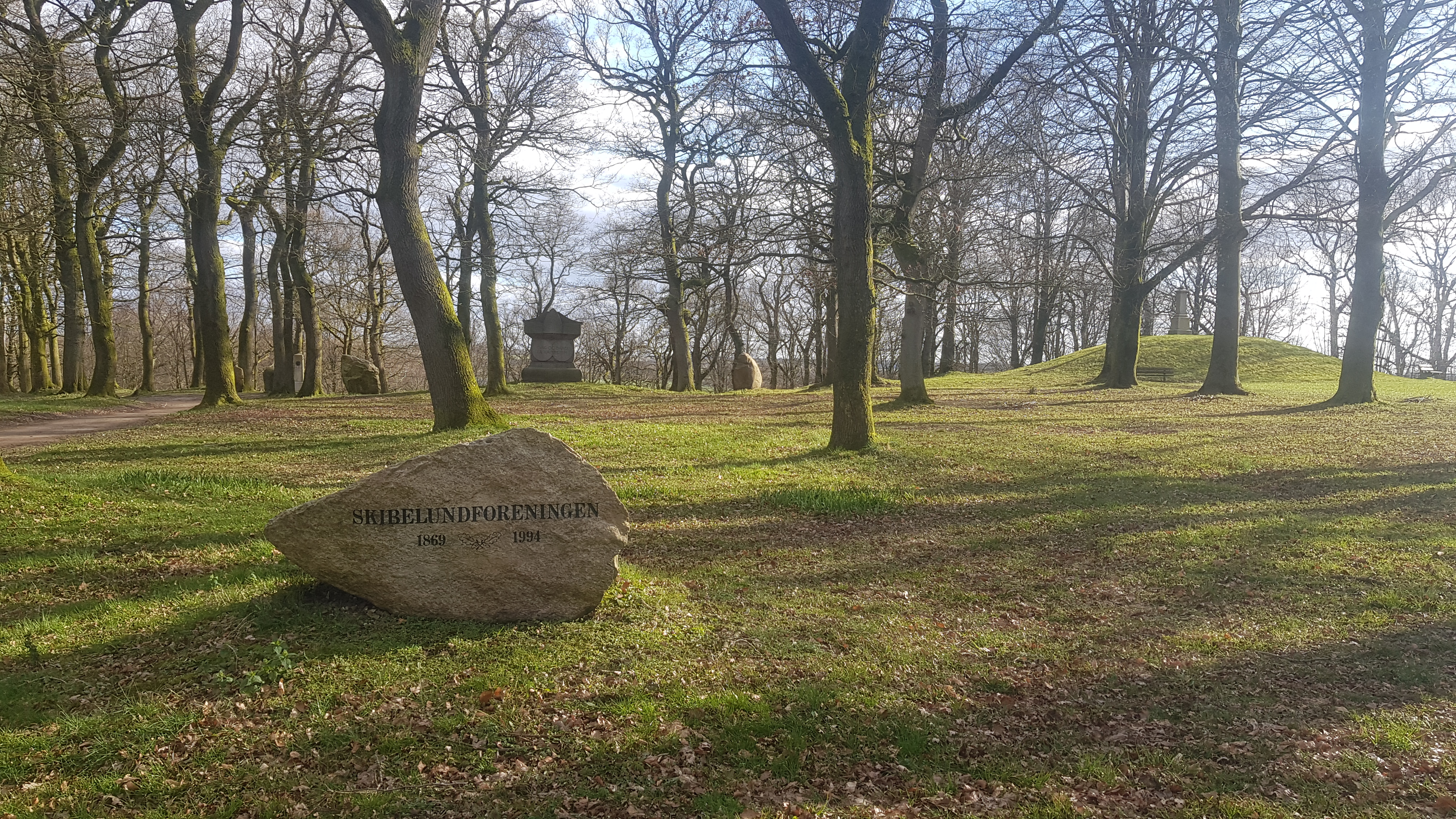 Mindesten i Skibelund Krat